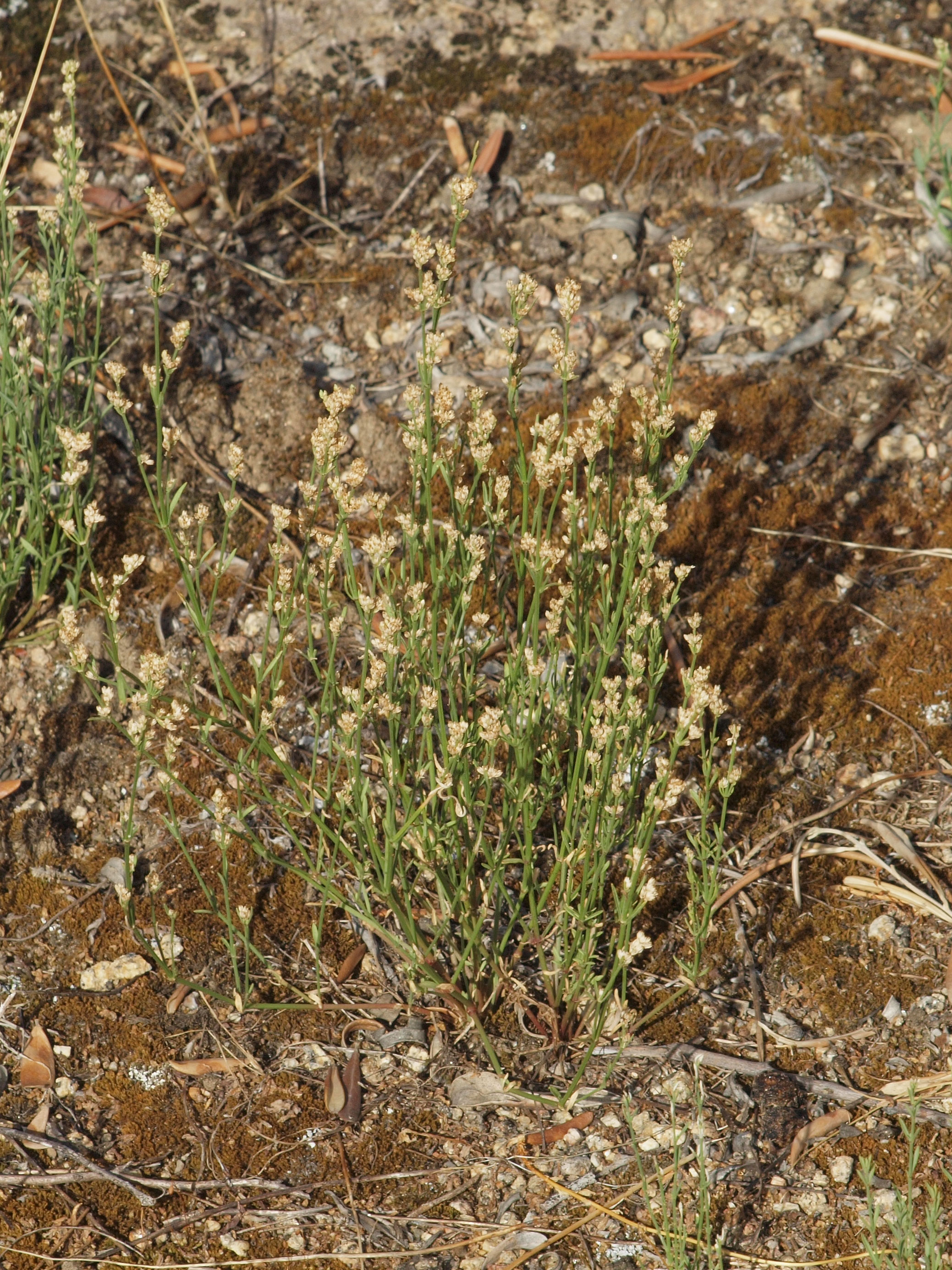 Ortegia hispanica, en el olivar, 480 msnm. Losar de la Vera (Cáceres, España).